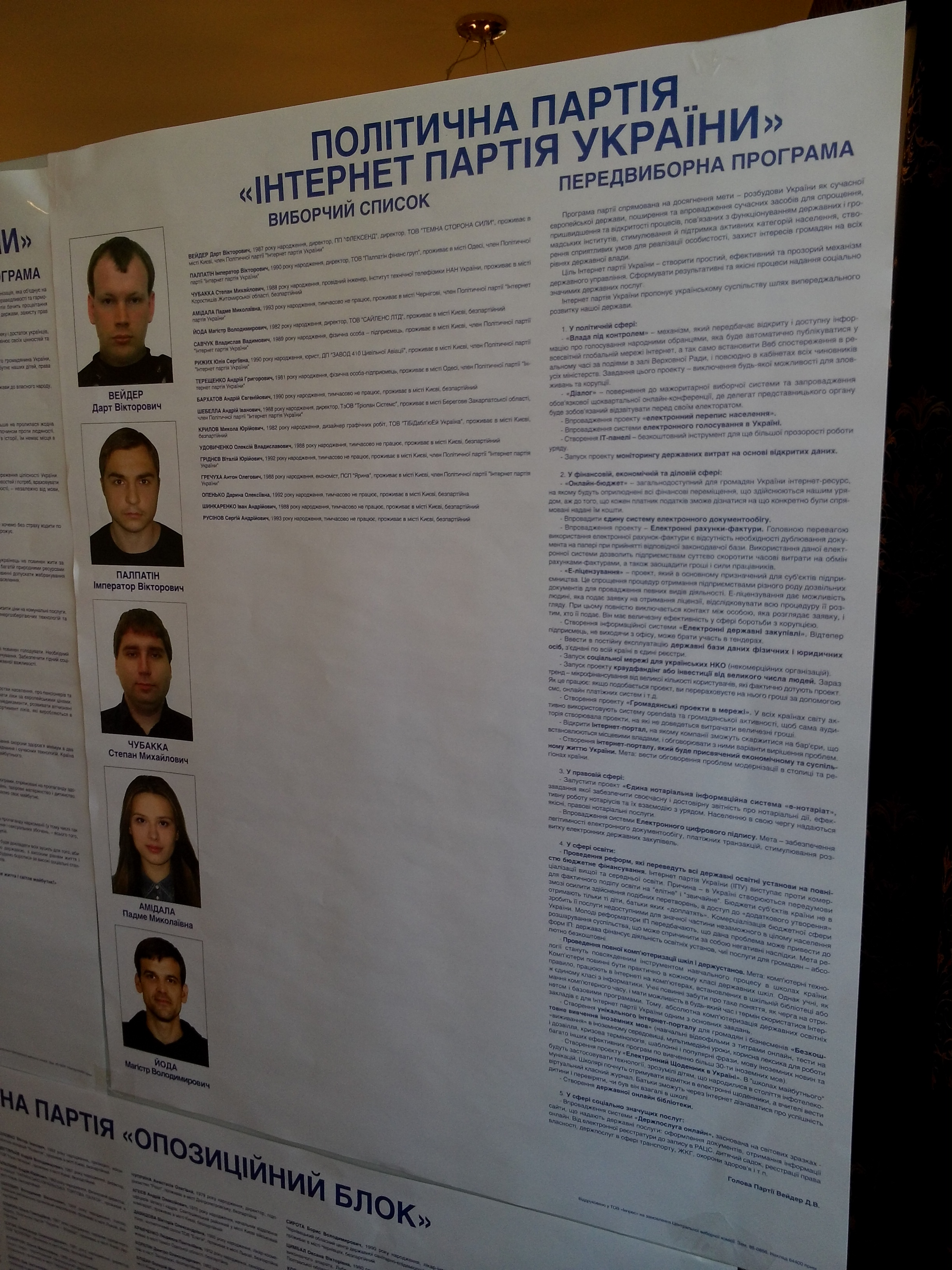 Виборчий список кандидатів Інтернет-партії України на парламентських виборах 2014 року